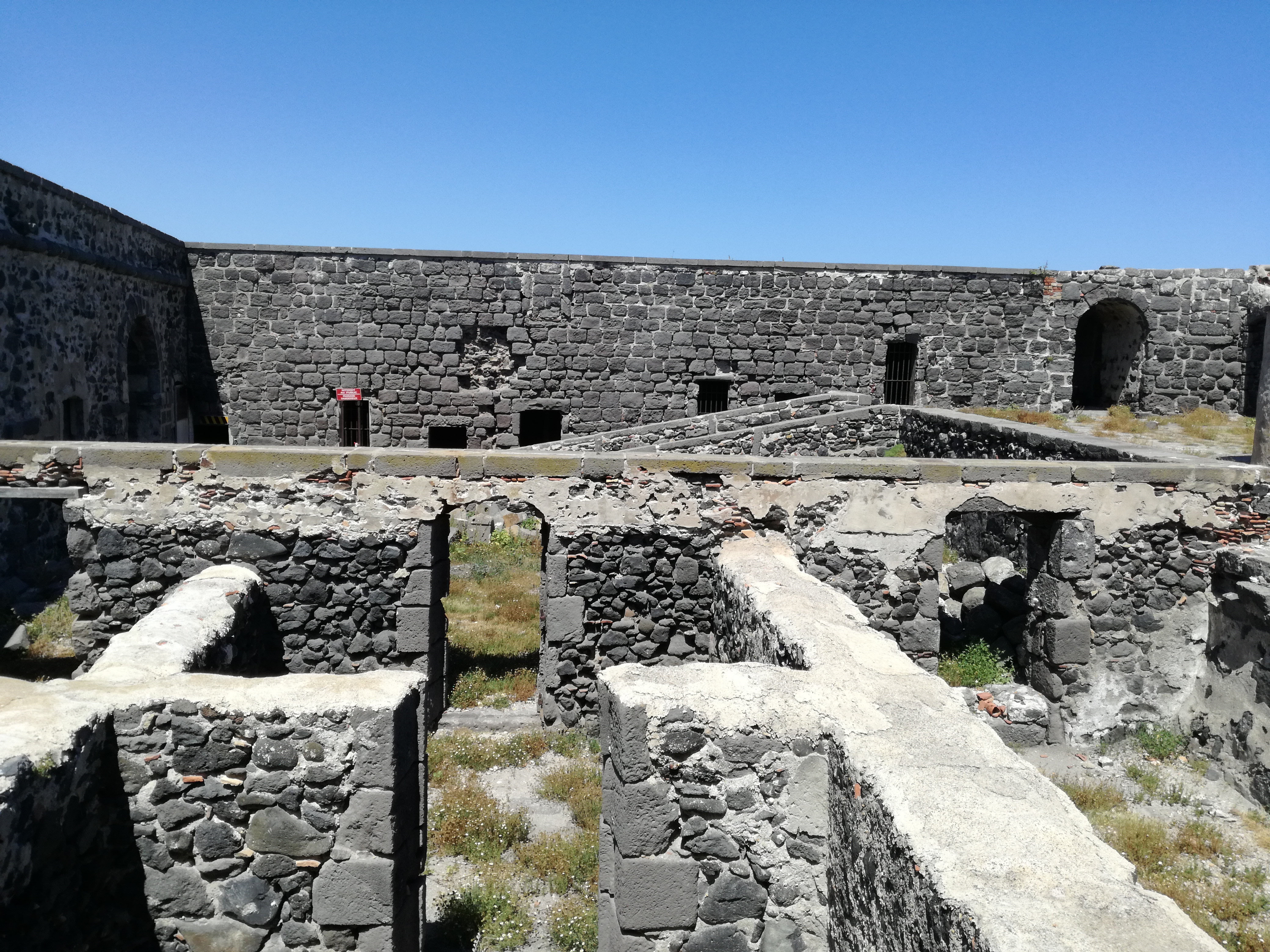 Cour du fort, les restes des anciennes cellules.